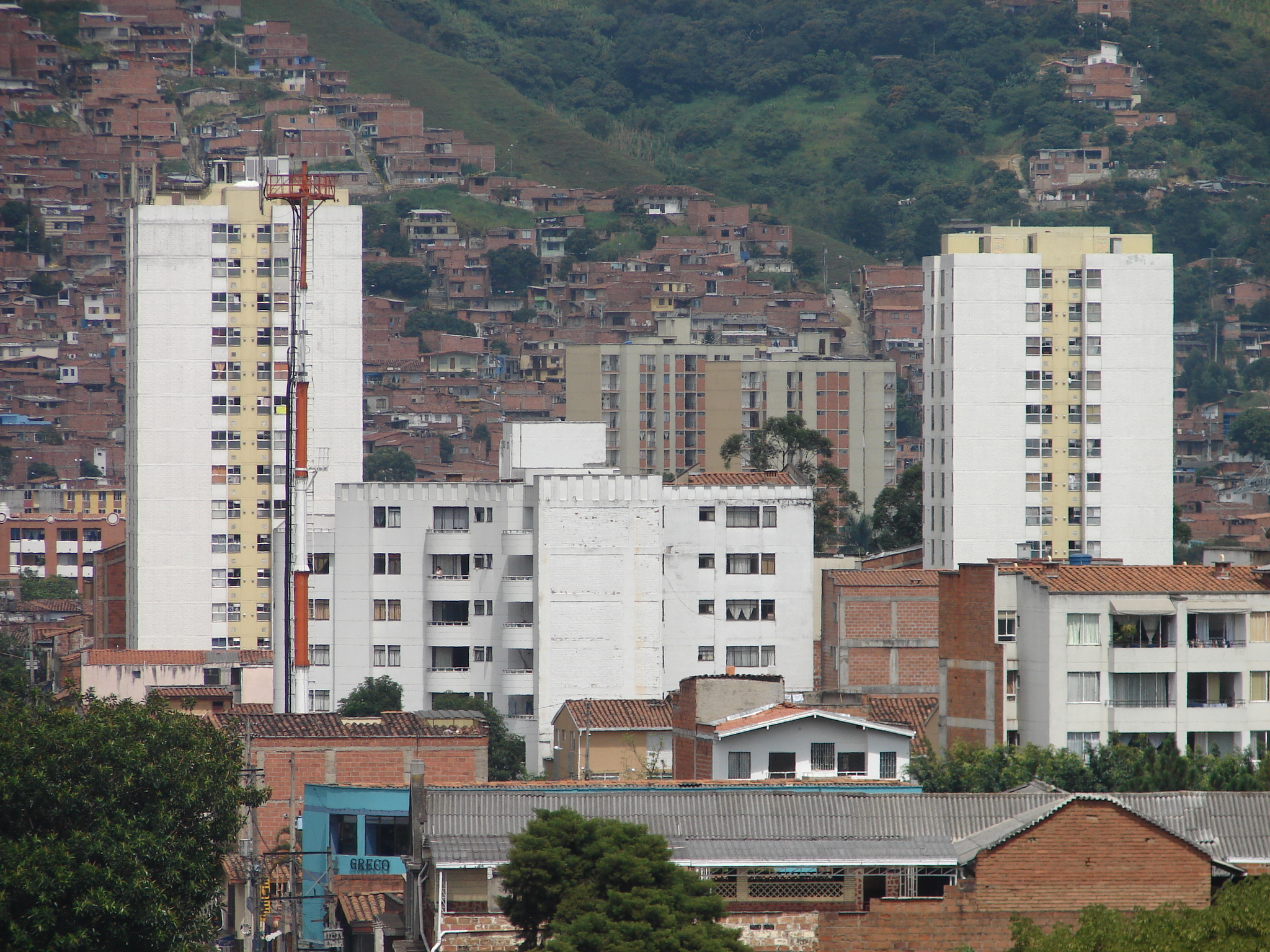 San Javier, Medellín, Colombia